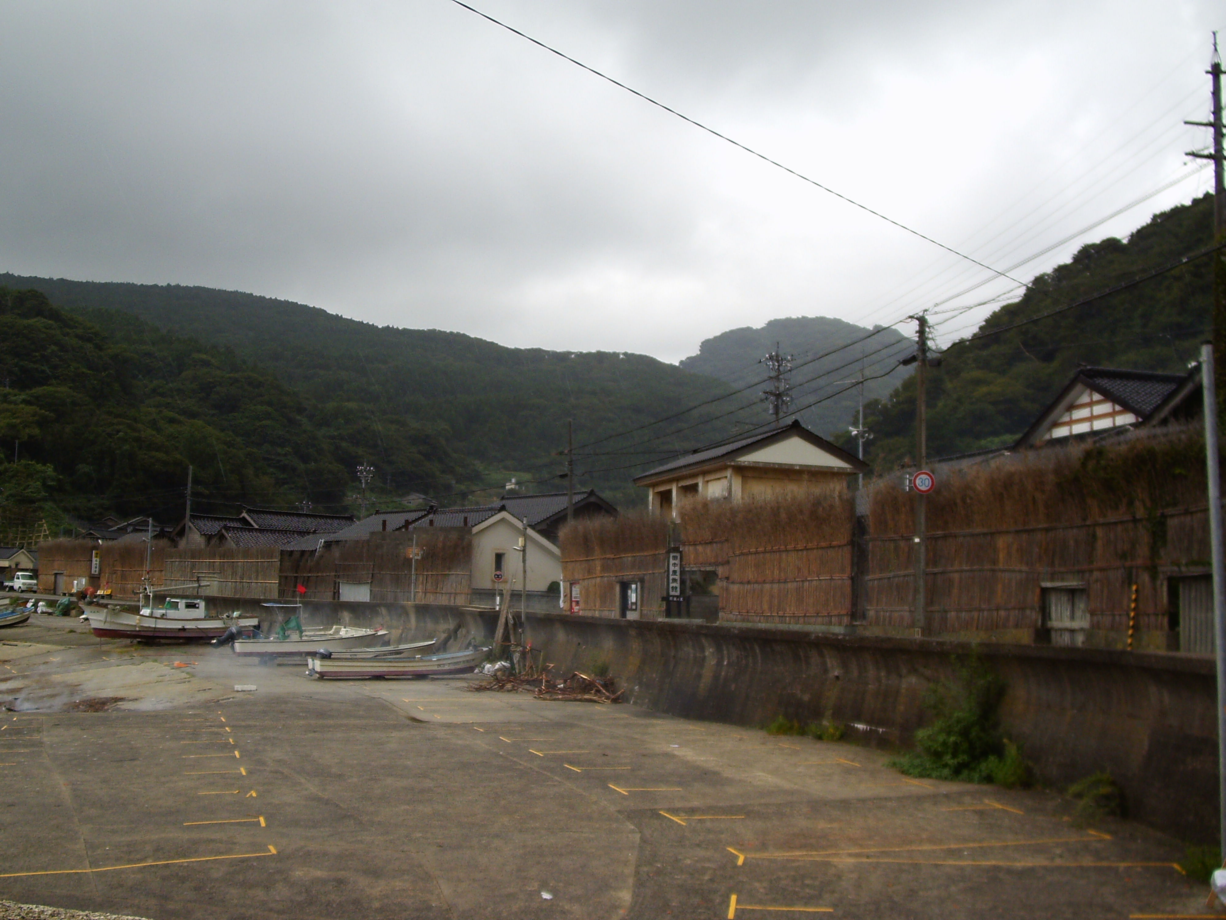 重要文化的景観「大沢・上大沢の間垣集落景観」ー大沢地区